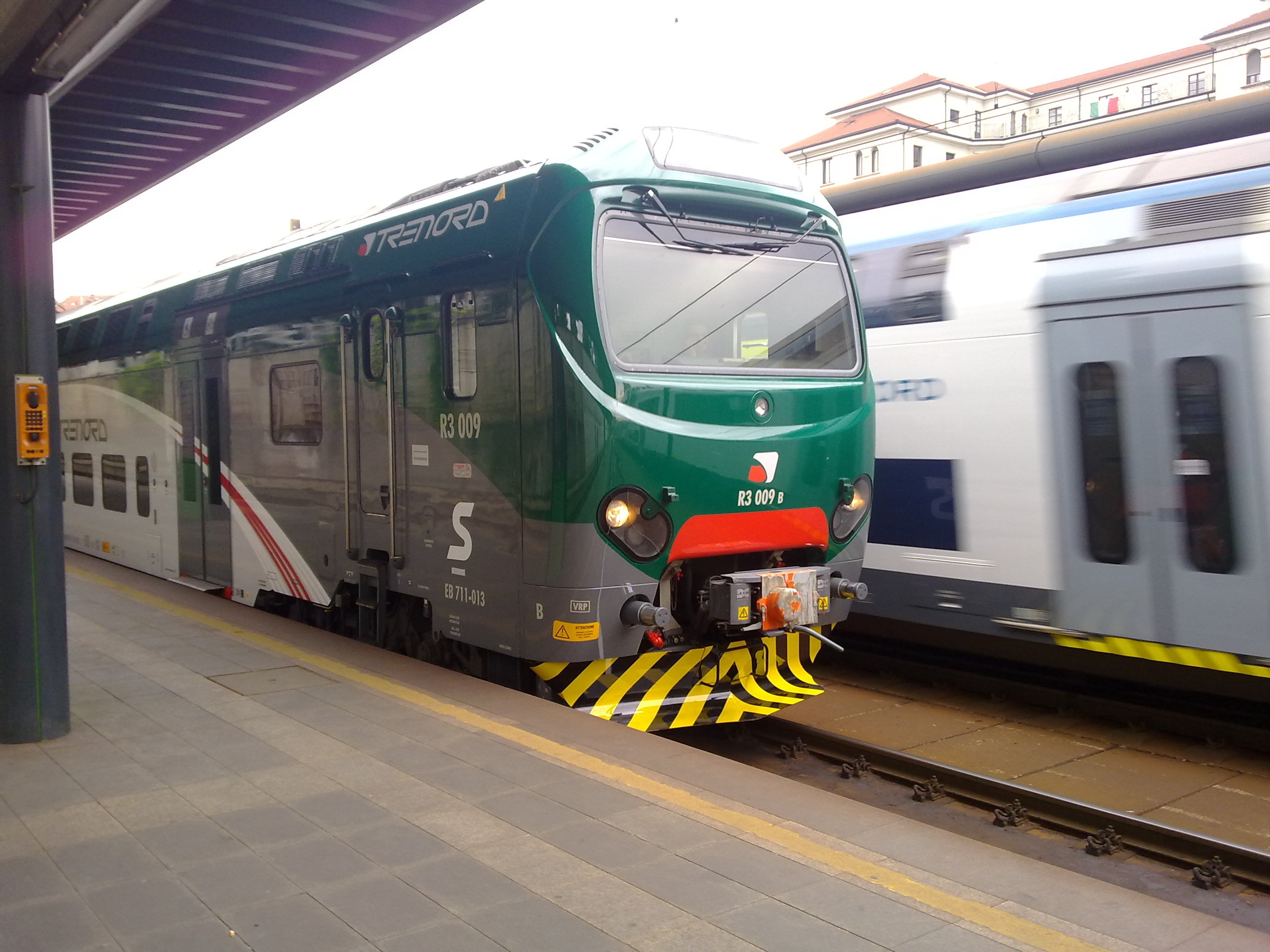 L'R3.009 (EB 711.013) in livrea Trenord, a Milano Cadorna